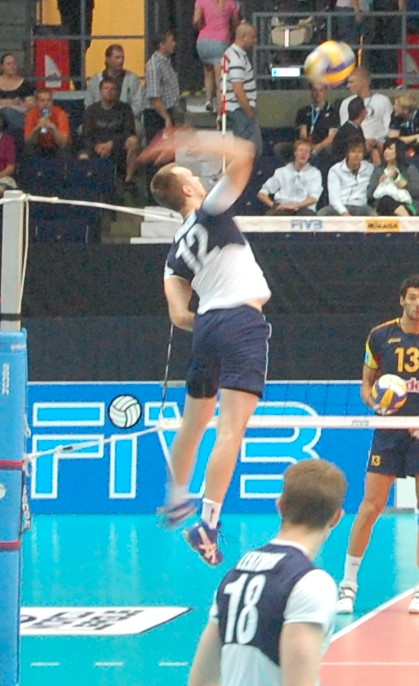 Finland volleyball player Olli Kunnari